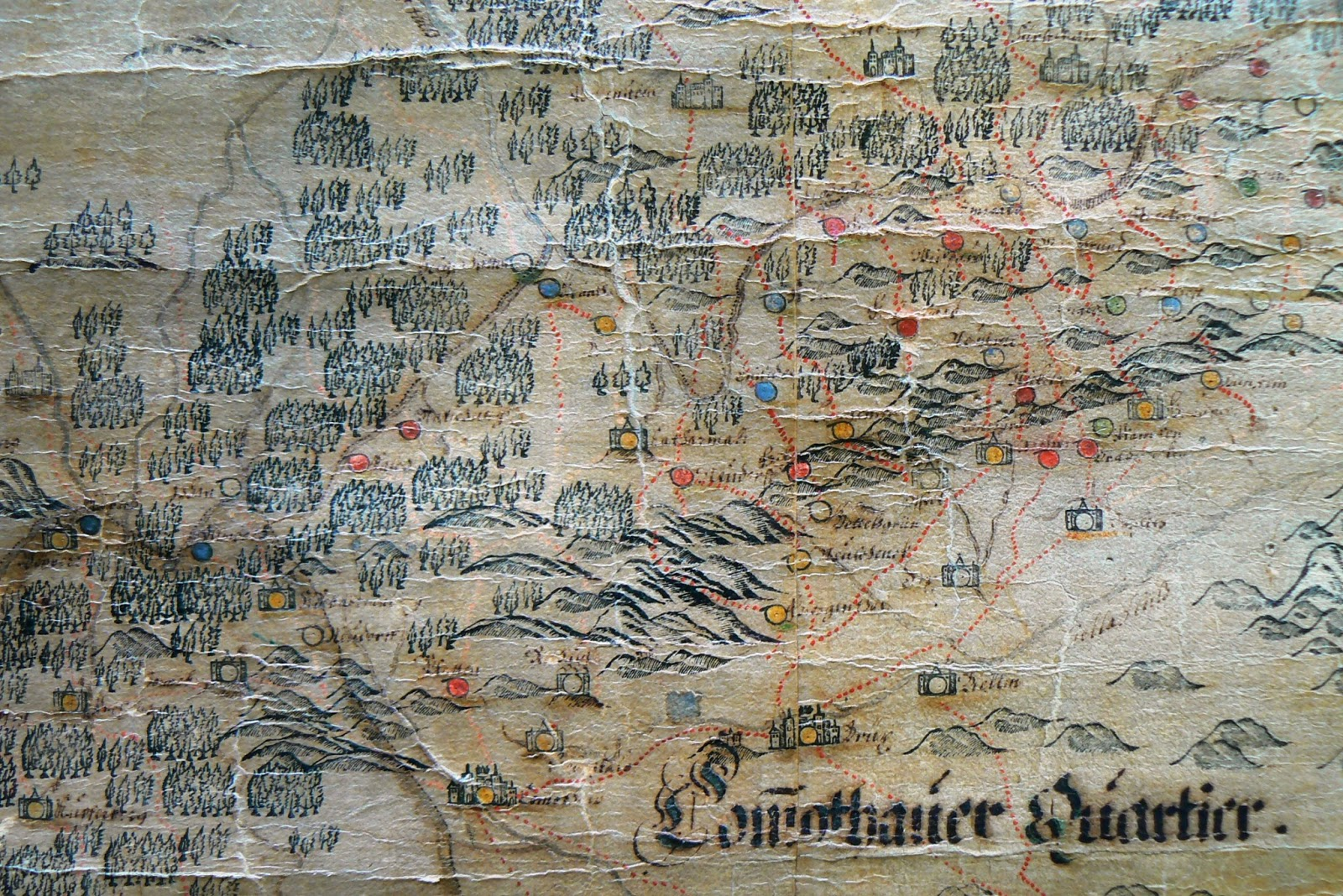 Stichova mapa